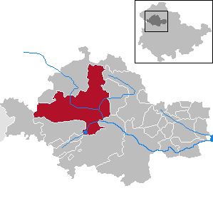 Mühlhausen/Thüringen in Thuringia - Unstrut-Hainich-Kreis